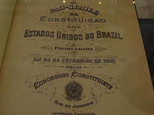 Foto de uma página da Constituição brasileira de 1891.